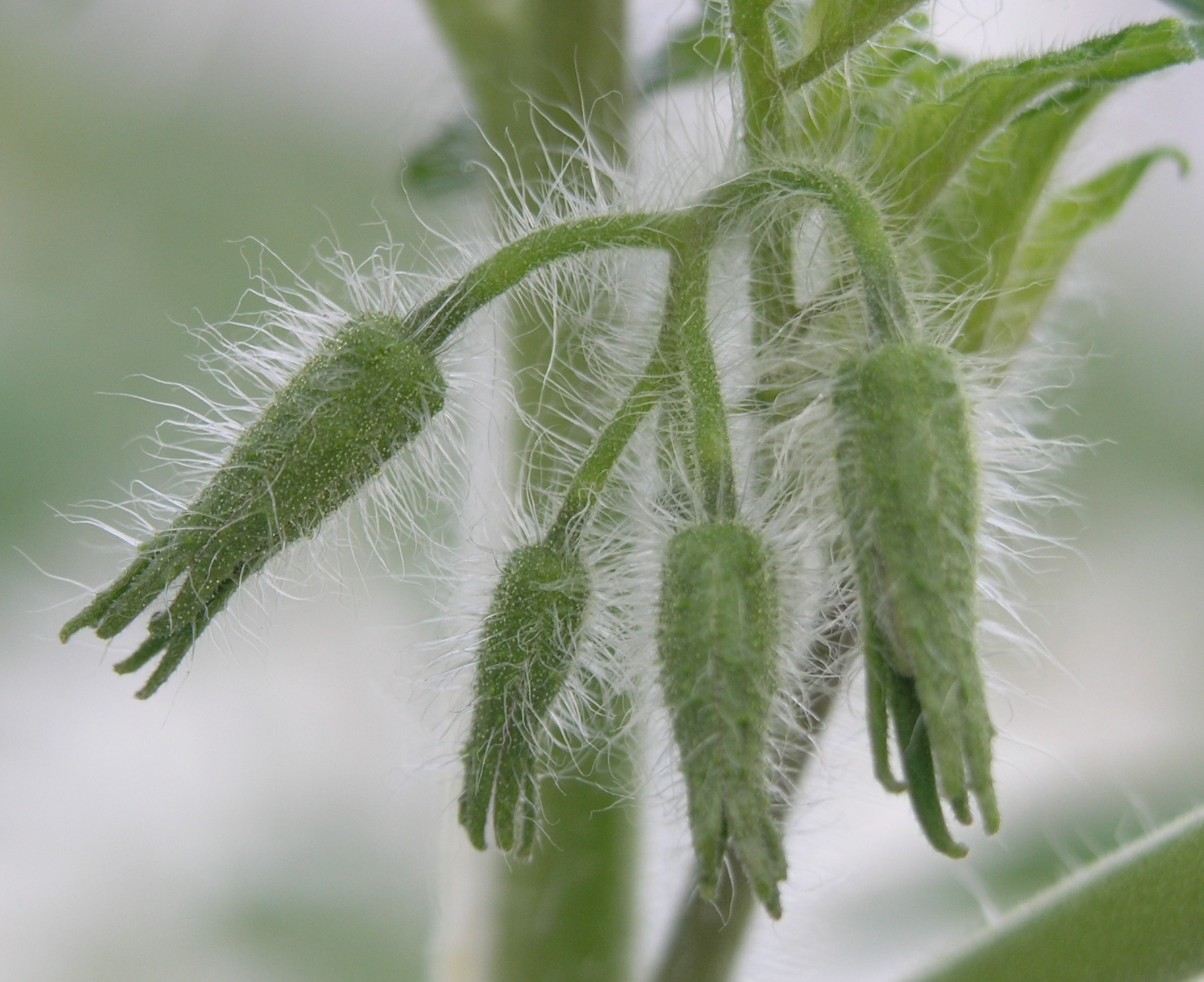 geschlossene Blüte einer Cherrytomate